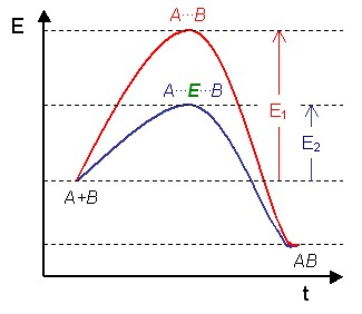 Graphique montrant l'énergie requise pour transformer un substrat avec et sans enzyme. Ficher créé par ... moi :) !